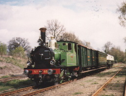 Foto van MBS-loc 657 "De Kikker" (zelf genomen)